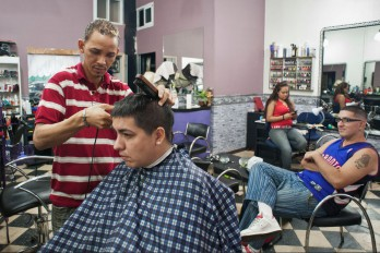 numerosos dominicanos que tienen un empleo se dedican al rubro de peluquería en Argentina